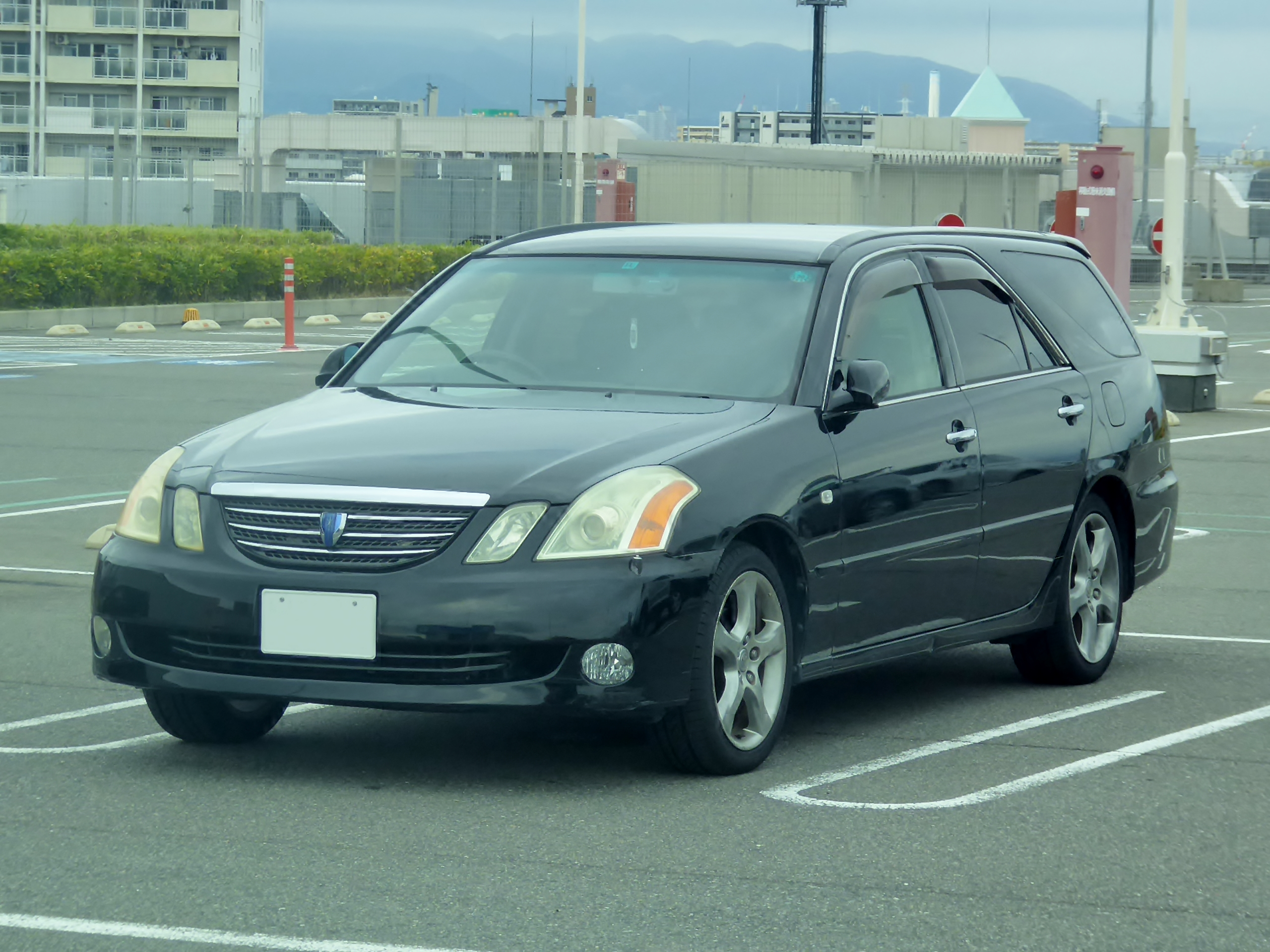 GH-JZX110W型トヨタ・マークIIブリット2.5iR-Vをフロントから撮影。